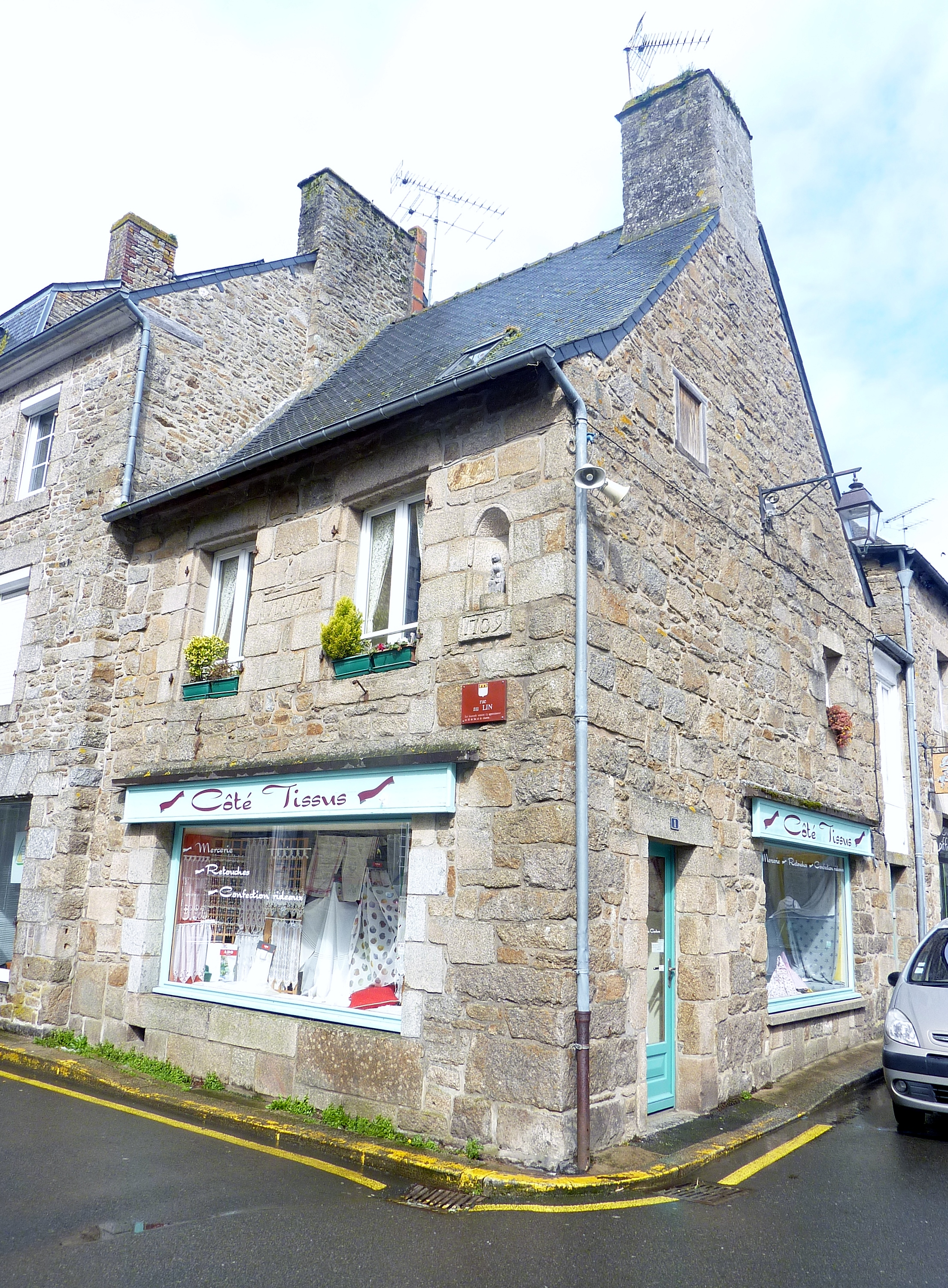 Maison datant de 1709 située à l'angle de la "rue au Lin" et de la place de la République à Quintin.